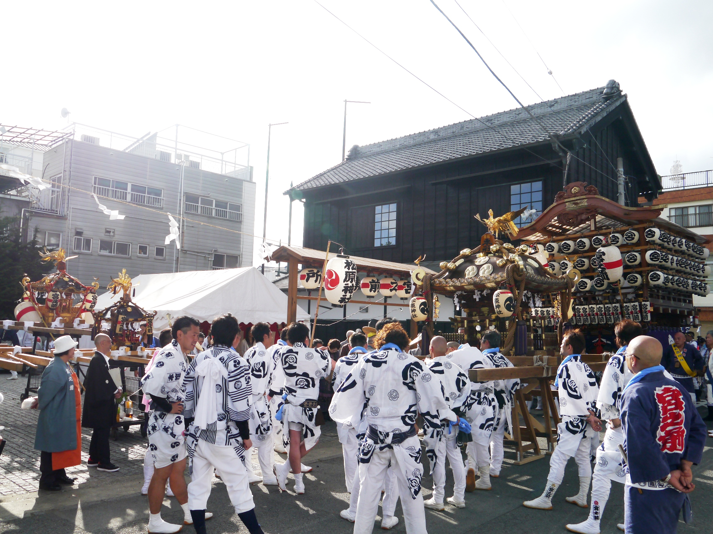 大きさ比較：町会大人神輿、子供神輿、本社神輿、山車（小田原式本山車）。松原神社